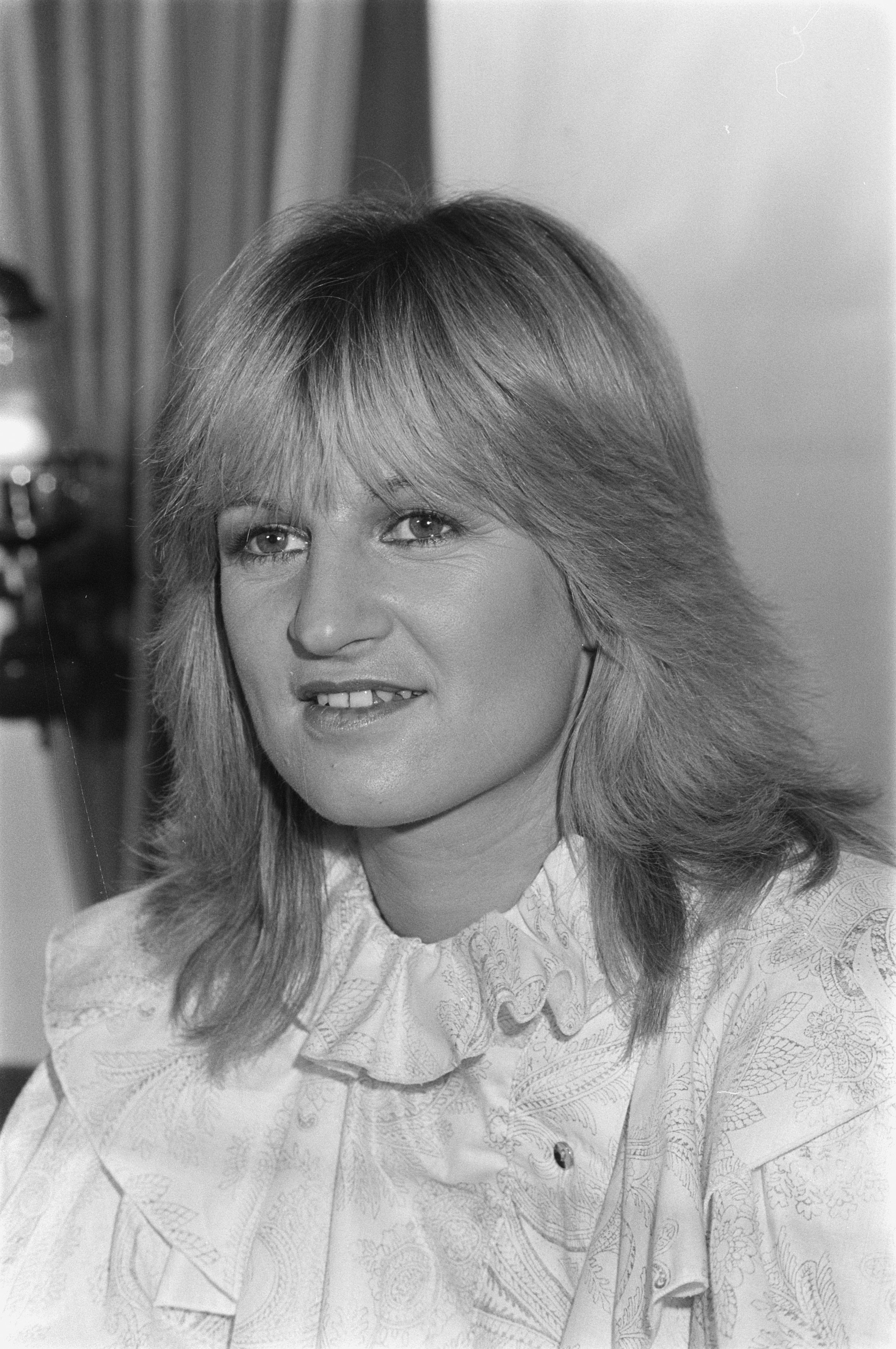 Collectie / Archief : Fotocollectie Anefo Reportage / Serie : Uitreiking "Kruiwagen" en "Conamus Export Prijs" tijdens radioprogramma Open House Beschrijving : Uitreiking "Kruiwagen" en "Export Prijs" tijdens radioprogramma Open House. Anita Meyer Datum : 31 december 1981 Trefwoorden : radioprogramma's, uitreikingen Persoonsnaam : Meyer, Anita Fotograaf : Dijk, Hans van / Anefo Auteursrechthebbende : Nationaal Archief Materiaalsoort : Negatief (zwart/wit) Nummer archiefinventaris : bekijk toegang 2.24.01.05 Bestanddeelnummer : 931-8881